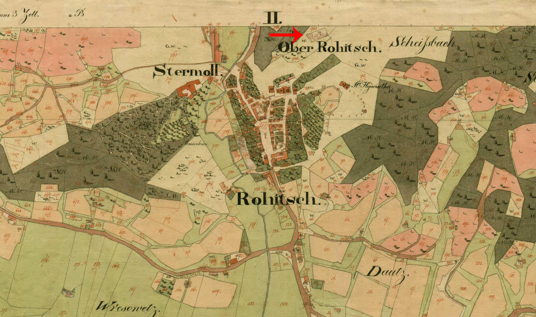 Franciscejski kataster za Štajersko, 1823-1869